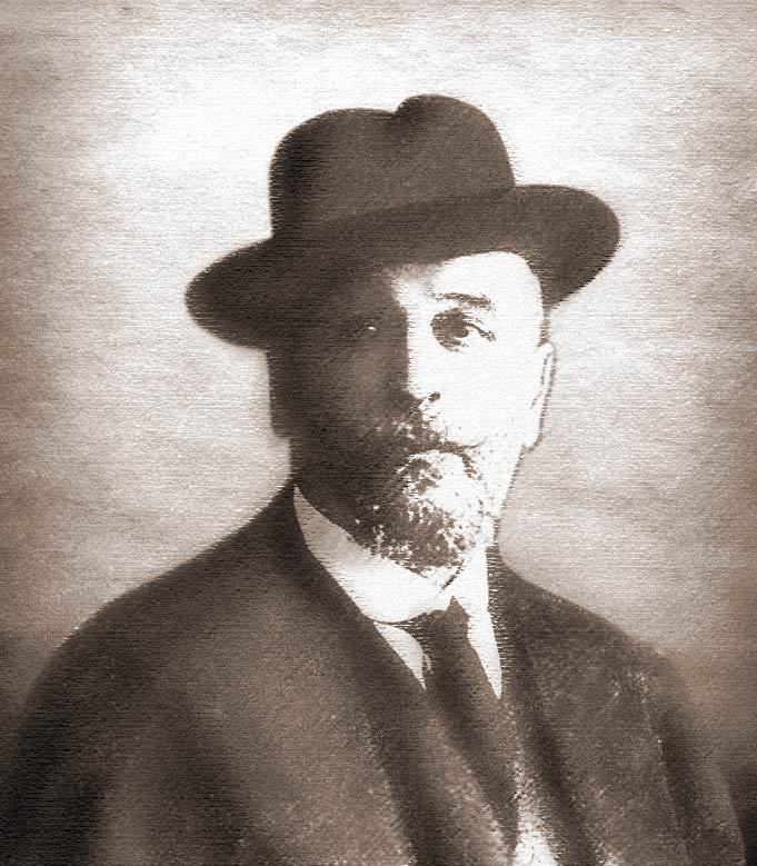 Giovanni_Battista_Marzi_-_Archivio_Famiglia_Marzi